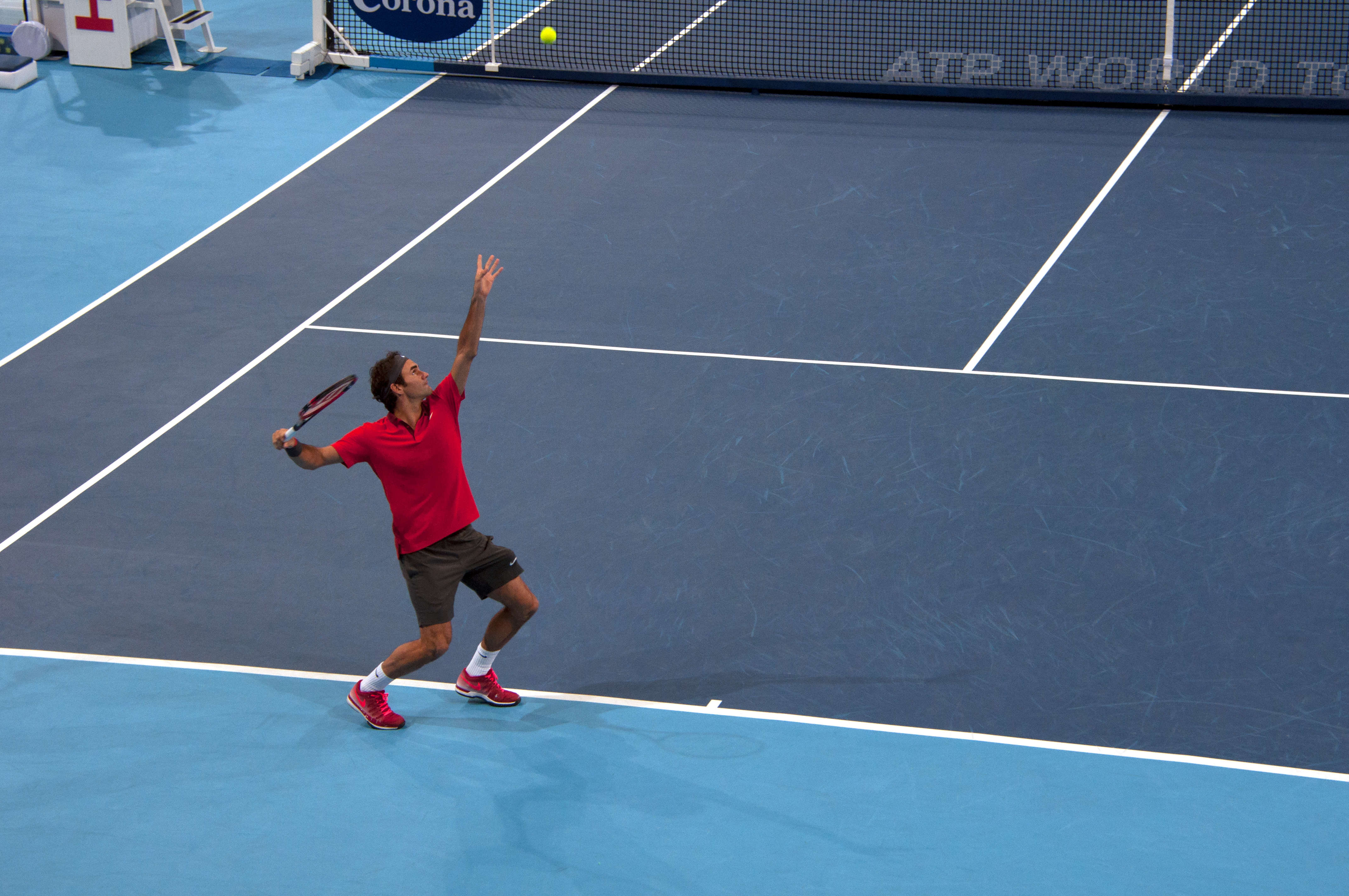 Basel Swiss Indoors 2014